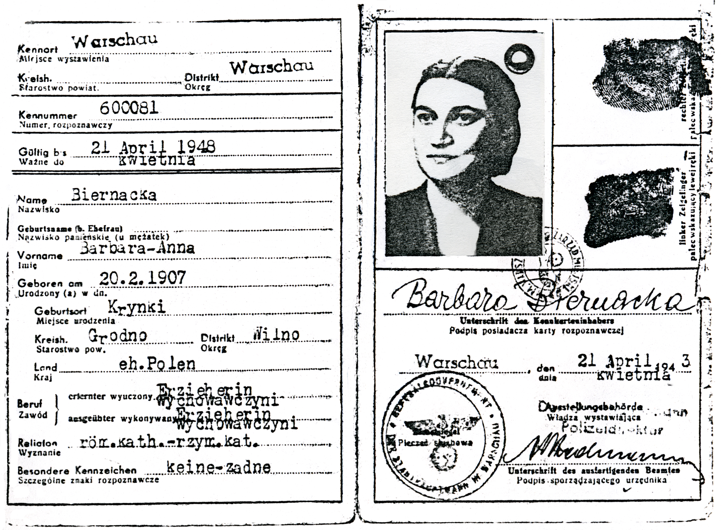 בתיה ברמן, תעודת זהות מזויפת